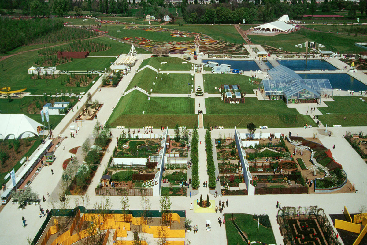 Aufnahme vom BUGA-Turm aus in Richtung Norden. Vorne die Schau der Gärten. Hinten links das Blumenband, das bis zum Eingang Praunheim reichte.